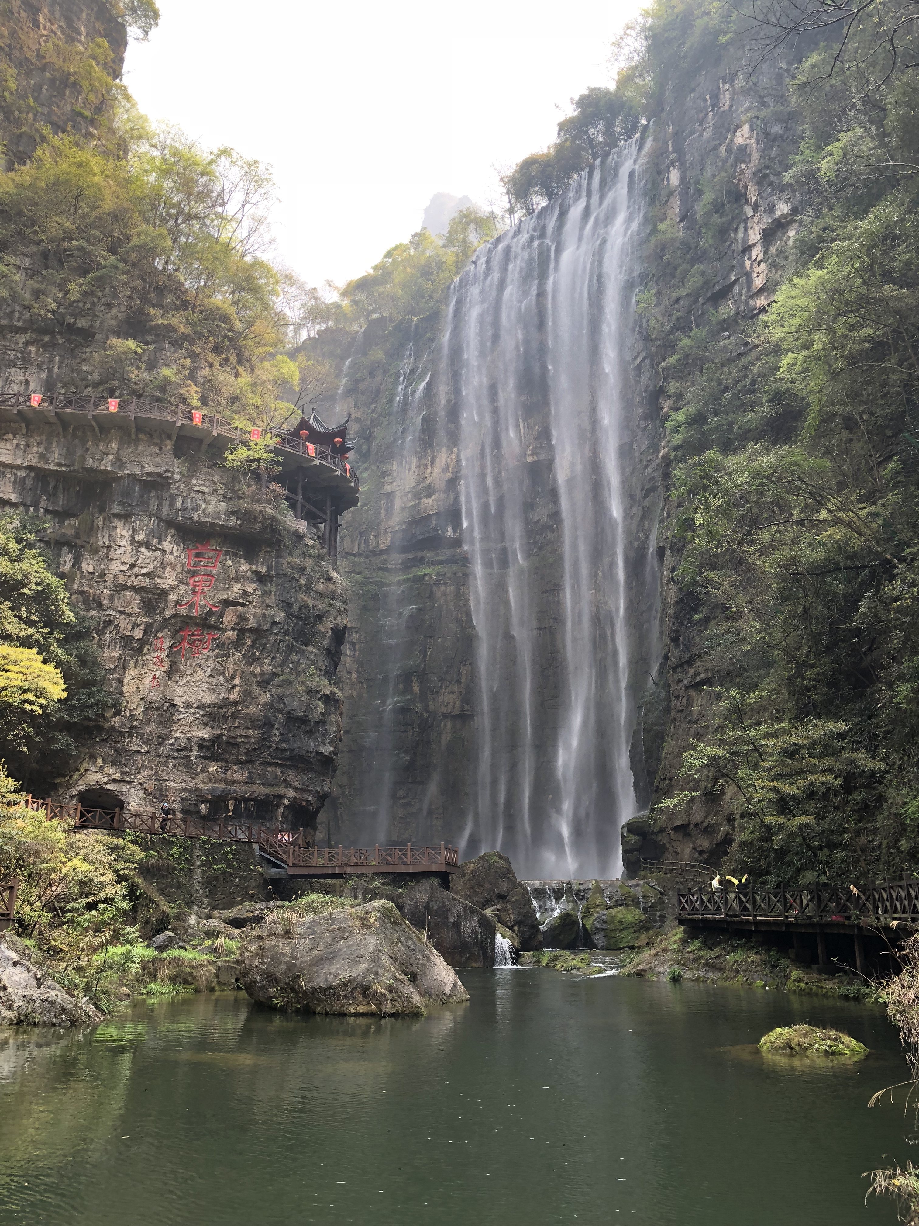 中文（中国大陆）: 宜昌三峡大瀑布景区